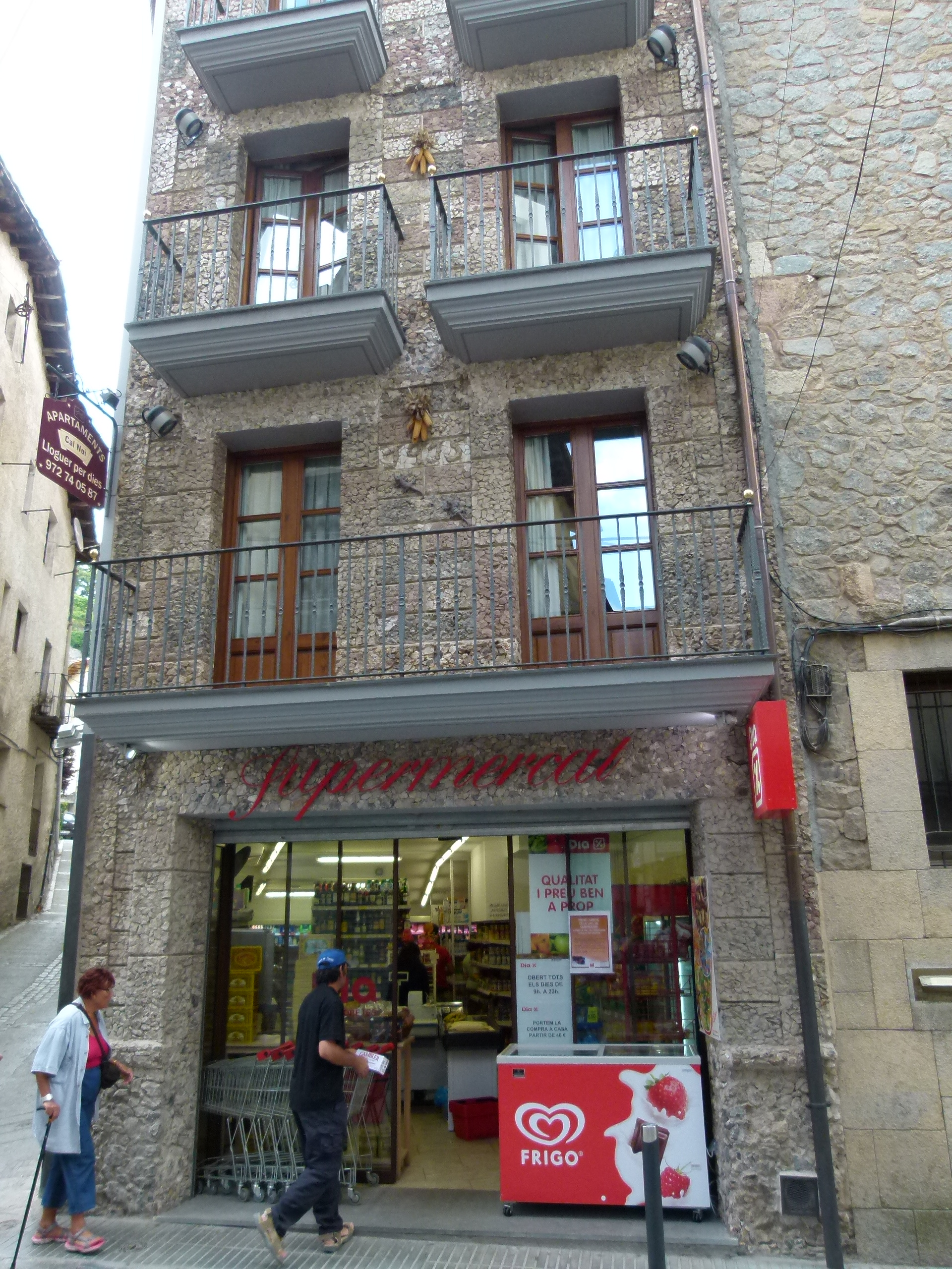 Can Jombi (Camprodon)